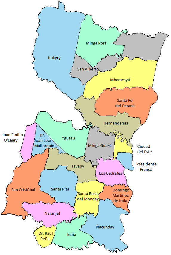 Mapa actual.